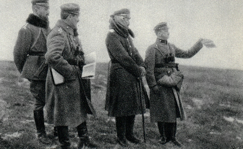 Por. Maciej Bold objaśnia płk Zygmuntowi Zielińskiemu sytuację na punkcie obserwacyjnym w czasie strzelania artylerii PKP.